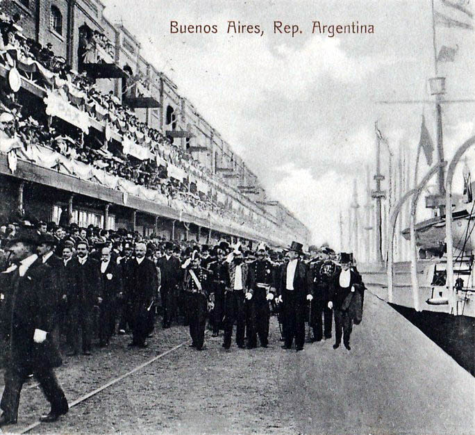 Una delegación del Gobierno de Chile desembarca en Buenos Aires, Argentina, en mayo de 1903, luego de la solución del conflicto limítrofe y la inauguración de la estatua del Cristo Redentor de los Andes.